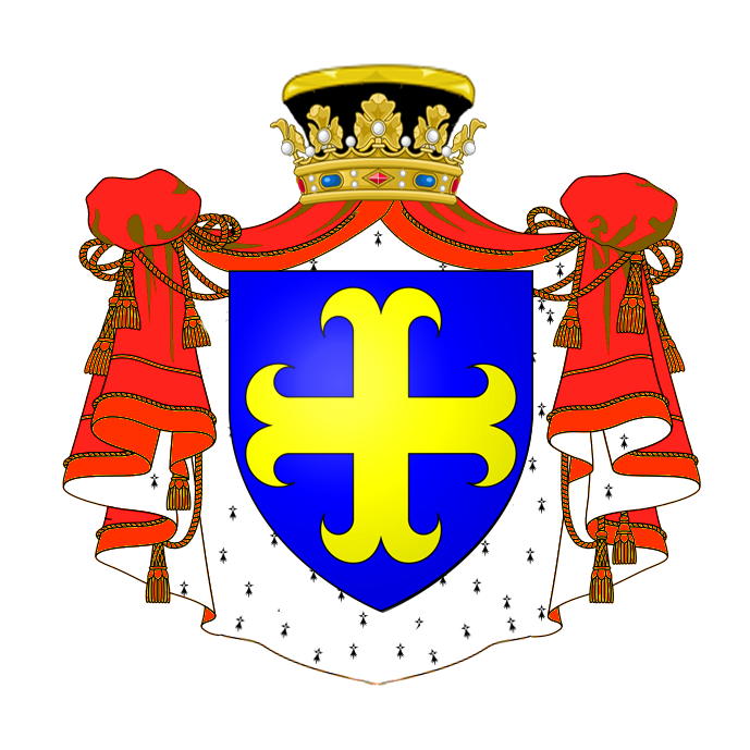 Armes de la famille Loppin de Montmort avec ornements de président à mortier de parlement